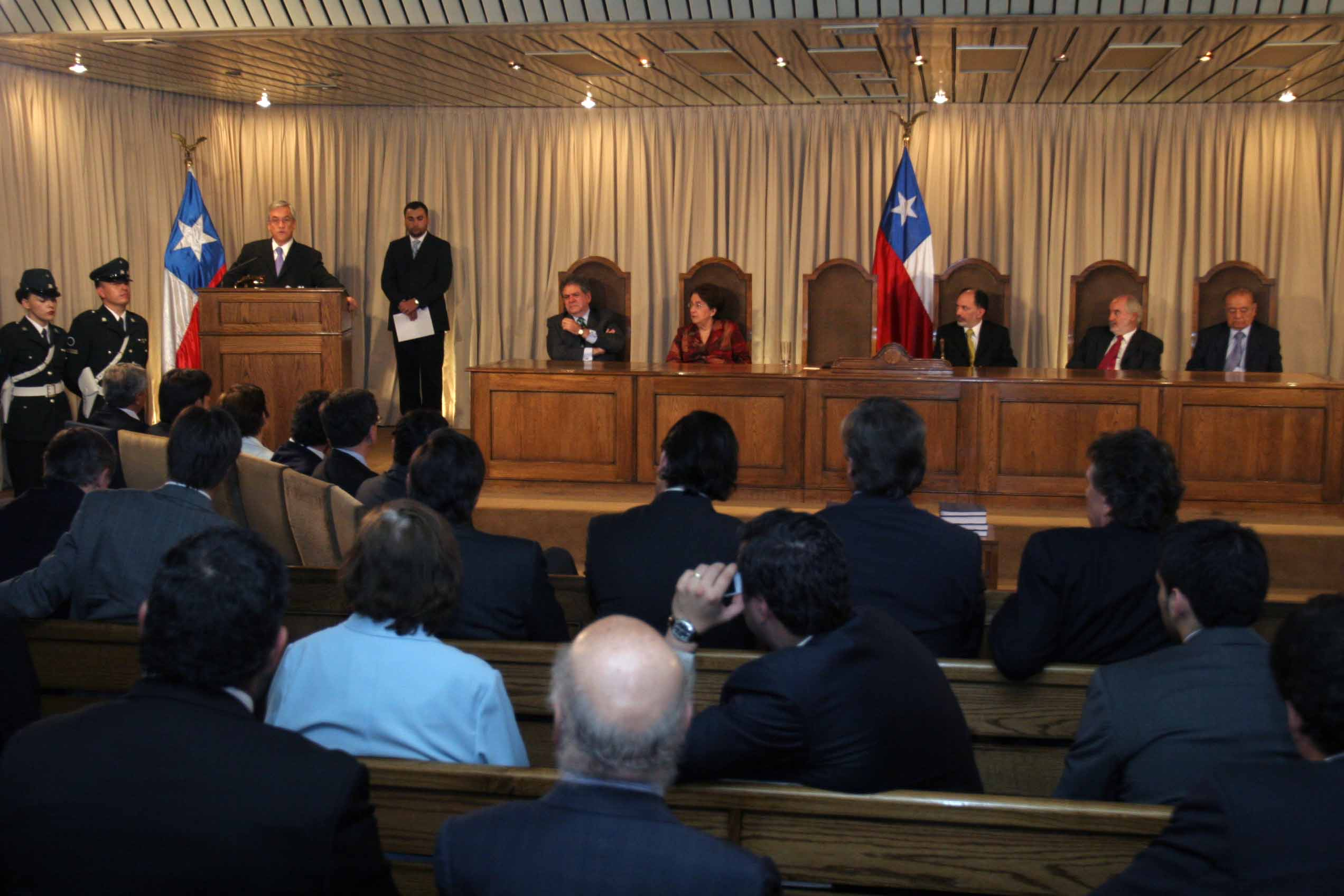 Tribunal Calificador de Elecciones de Chile junto al Presidente electo de Chile, Sebastián Piñera.